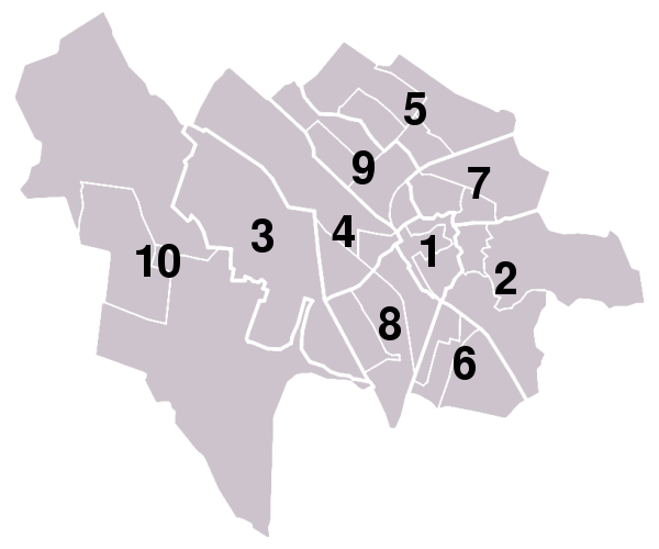 Wjken: Binnenstad Utrecht-Oost Leidsche Rijn Utrecht-West Overvecht Utrecht-Zuid Utrecht-Noordoost Utrecht-Zuidwest Utrecht-Noordwest Vleuten-De Meern